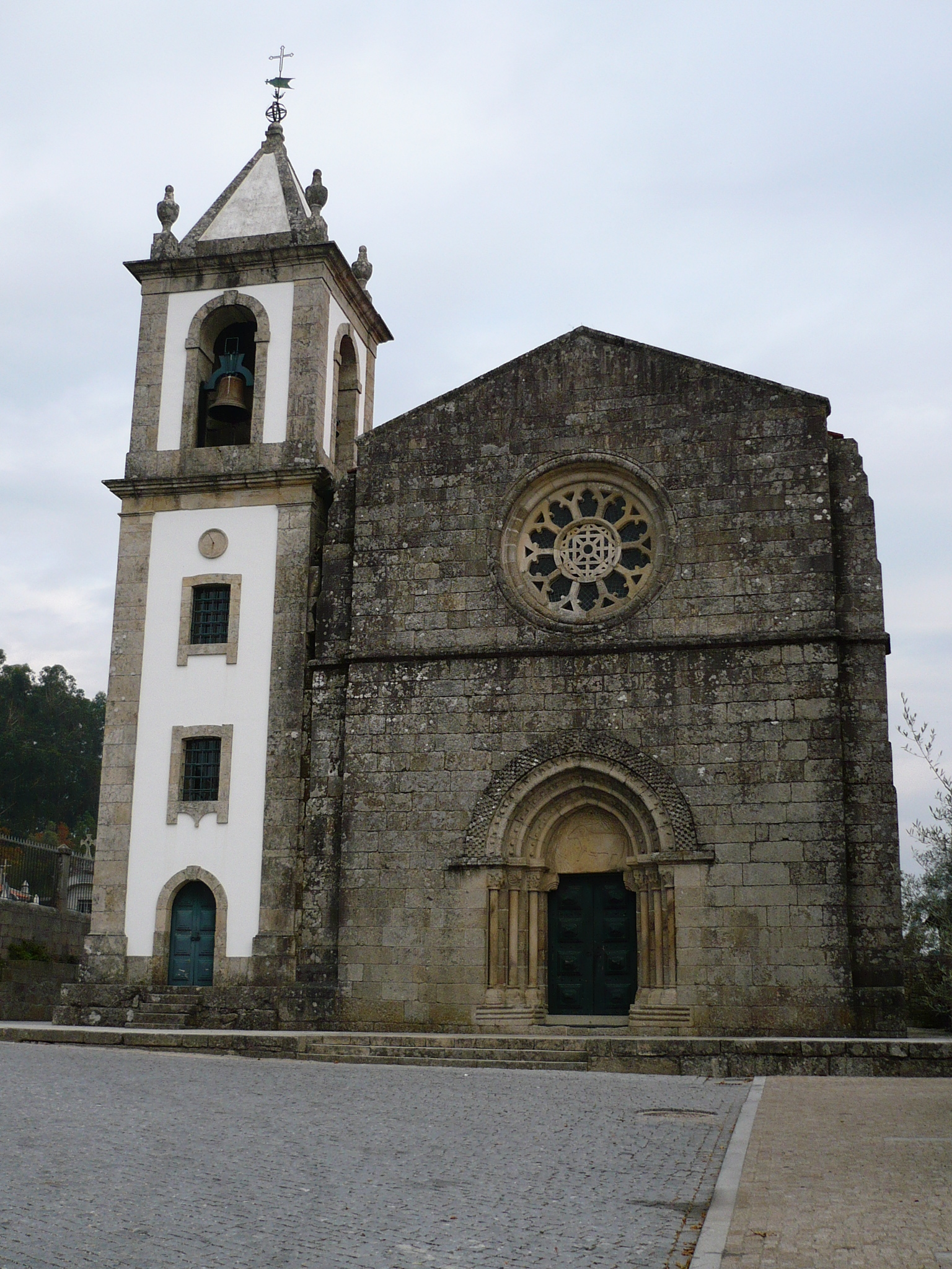 Frontaria da Igreja de Fontarcada